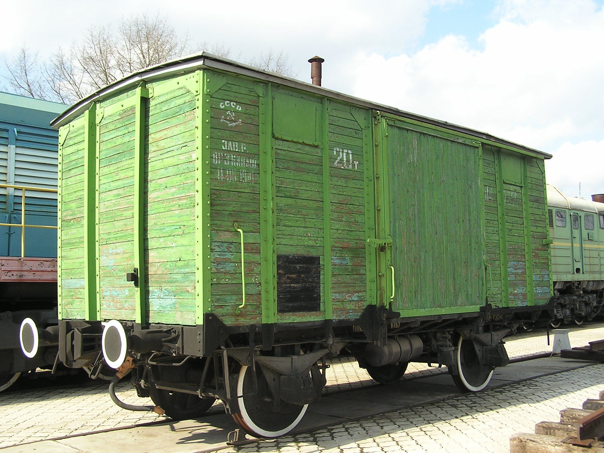 Музей истории и развития Донецкой Железной дороги. Нормальный товарный вагон (НТВ)